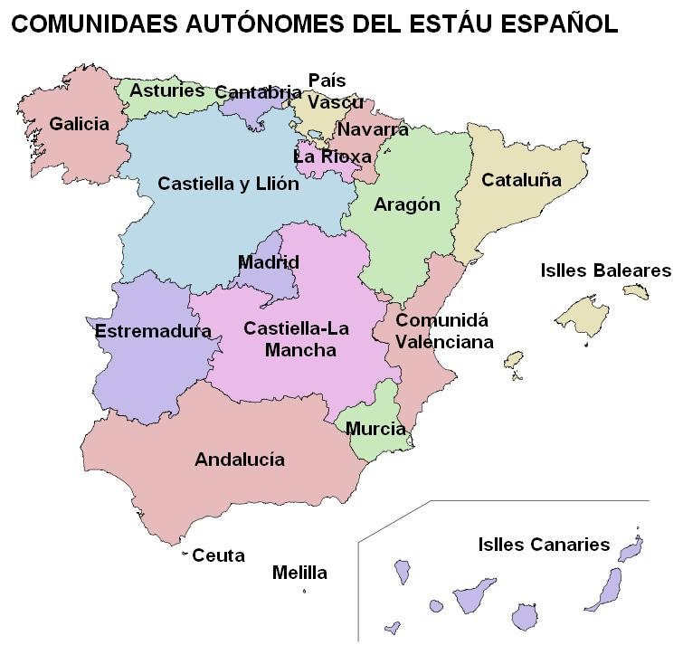 Die 17 Autonomen Gemeinschaften oder Regionen Spaniens, vergleichbar den deutschen Bundesländern, und in die zwei Autonomen Städte Ceuta und Melilla